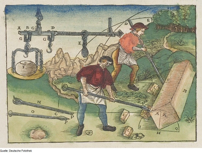 Original image description from the Deutsche Fotothek Waage & Mathematik & Hebelwirkung